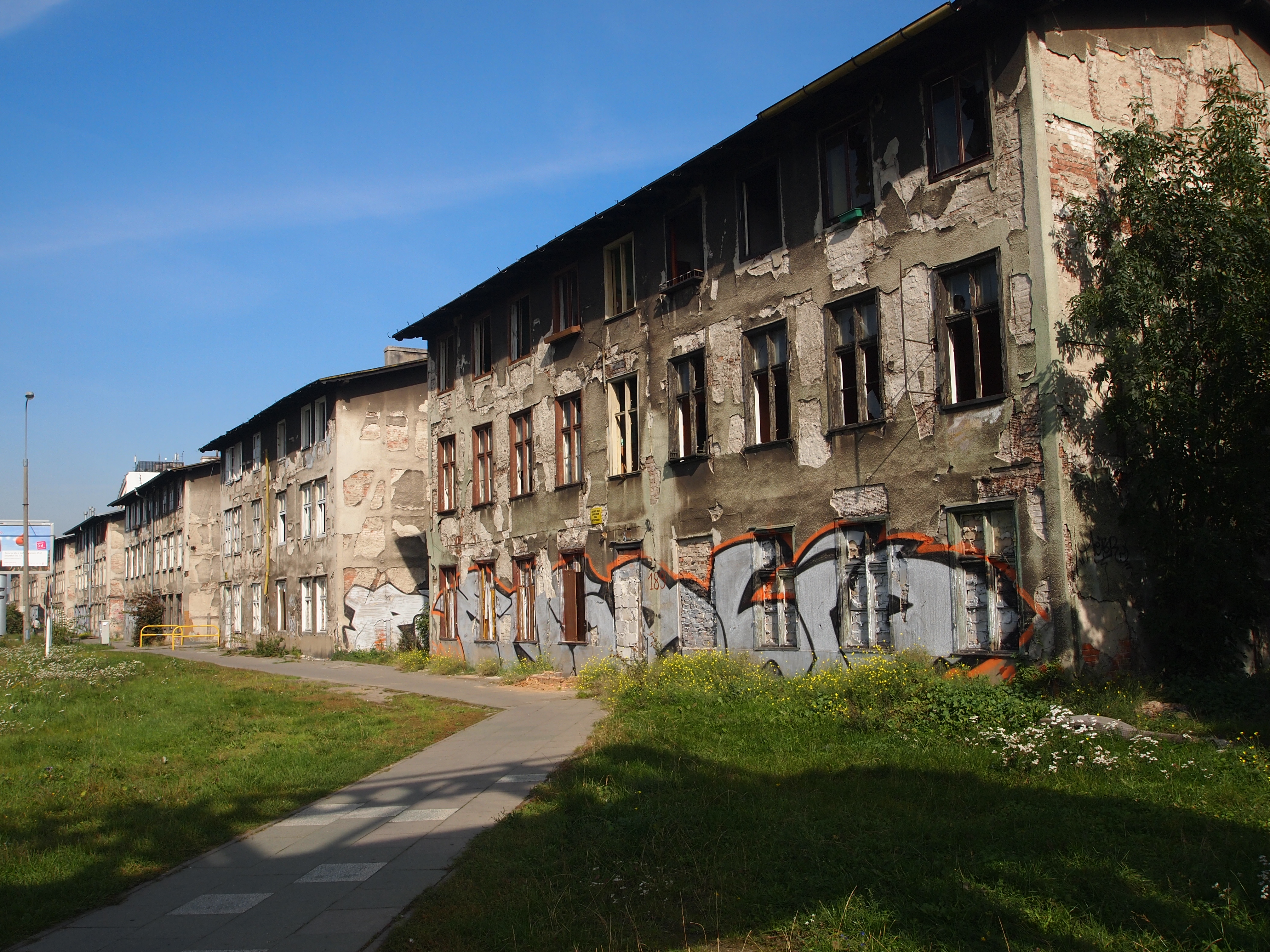 Gdańsk Młyniska, ul. Jana z Kolna.